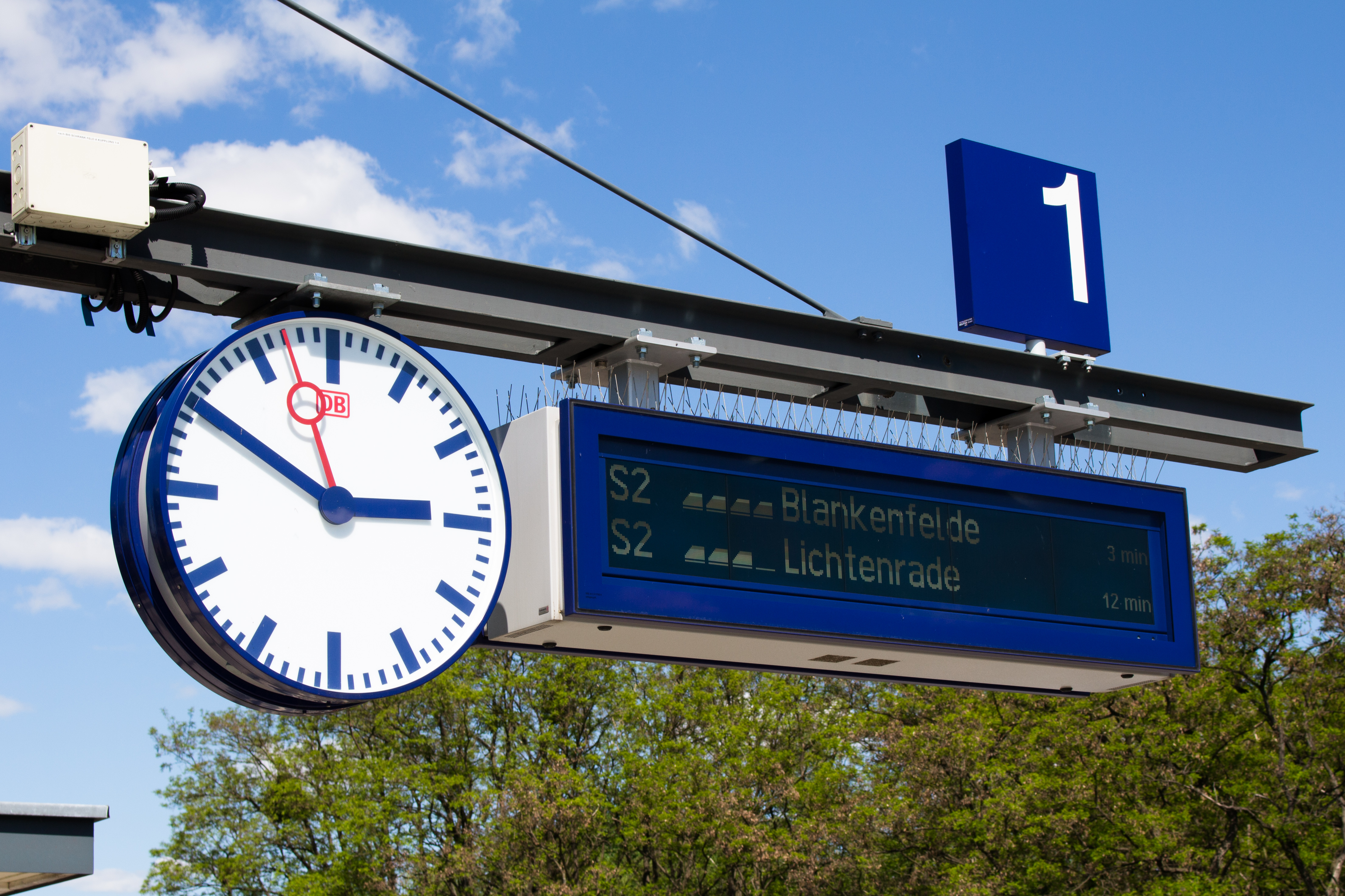 Fahrgastanzeigen am S-Bahnhof Priesterweg